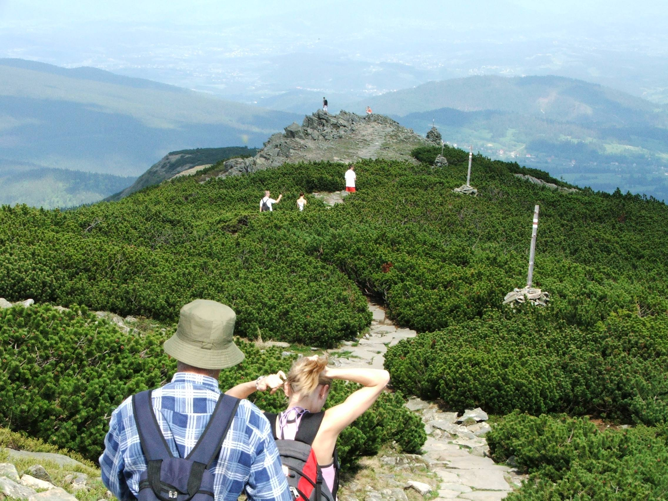 Babia Góra. Piętro kosówki